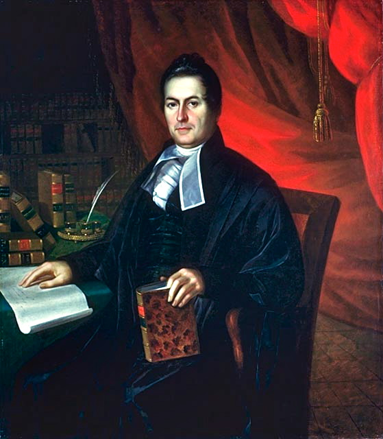 Portrait of Louis-Joseph Papineau (1786-1871)